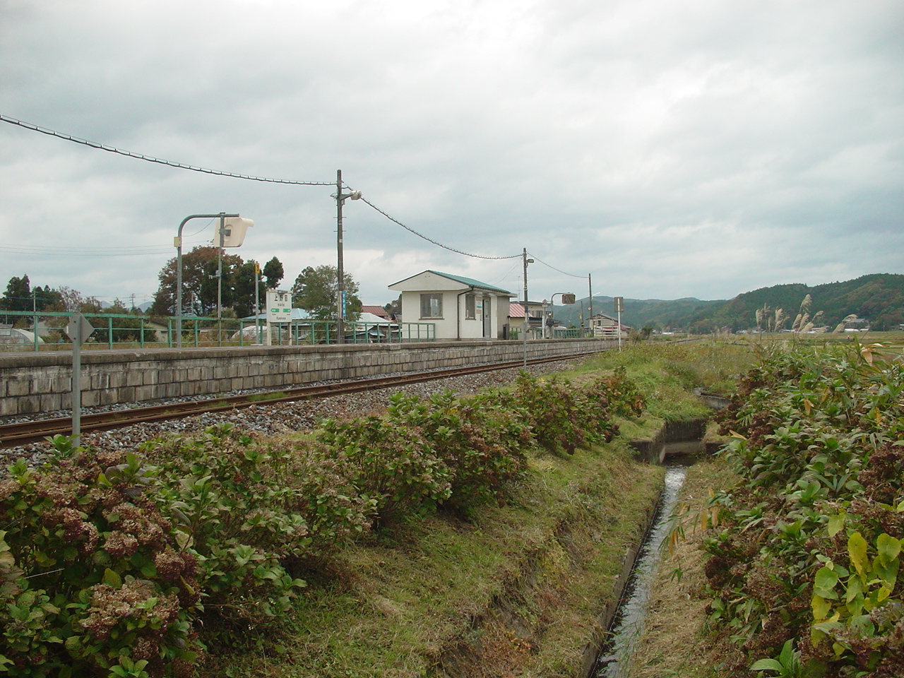 （上野目駅）